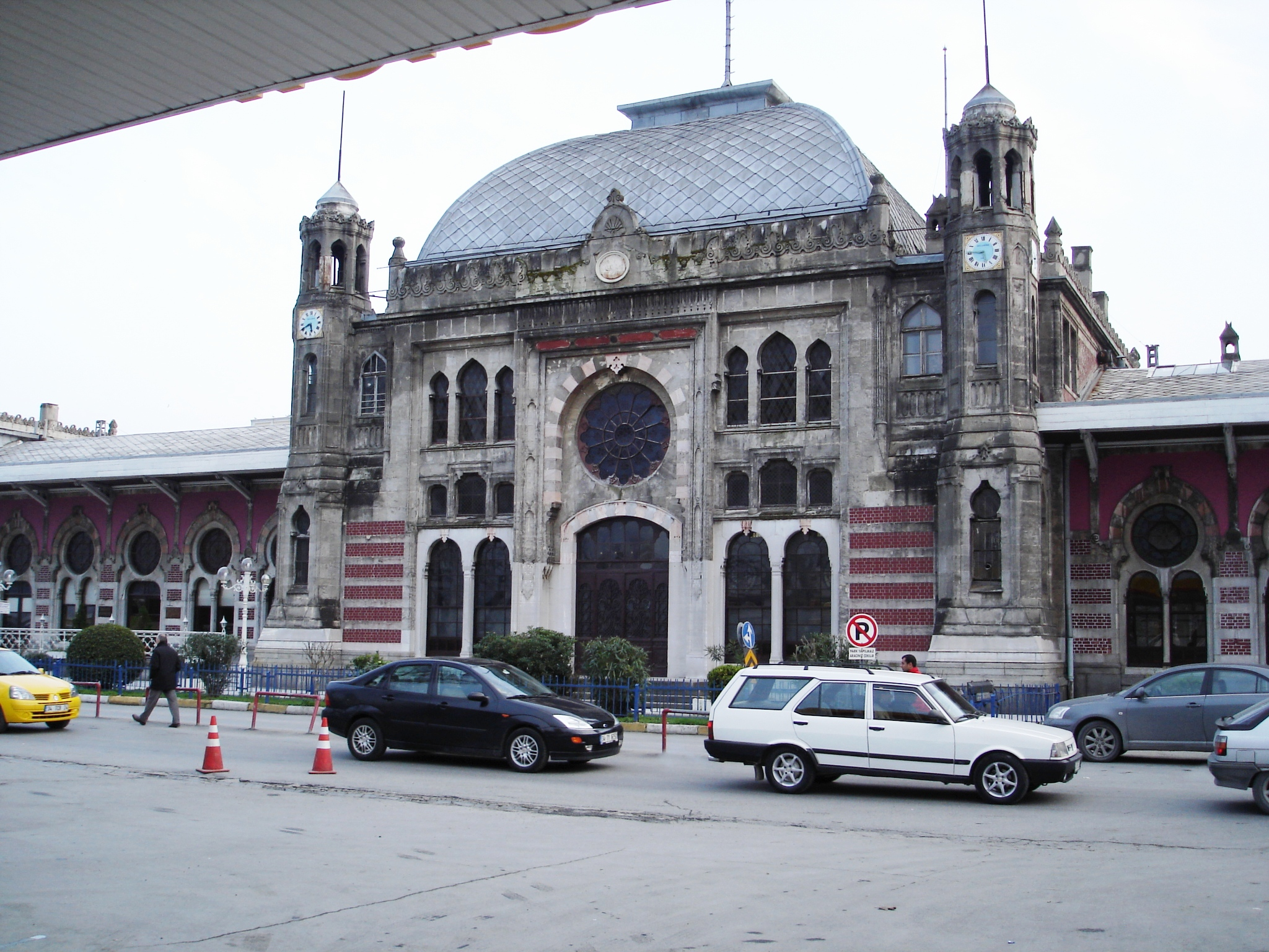 Sirkeci Bahnhof (Sirkeci Garı) / Sirkeci Railway Station (Sirkeci Garı) (Sirkeci, Istanbul/TR)